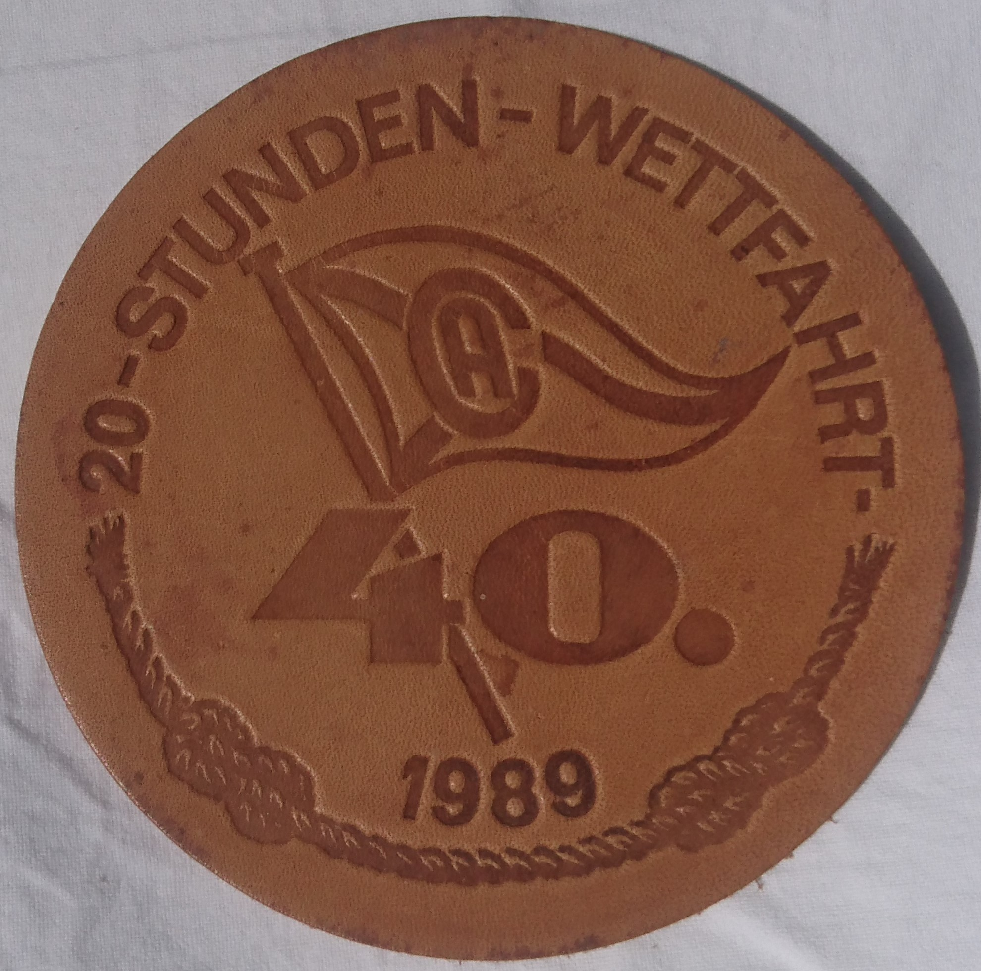 Teilnehmergeschenk *Finisher-Präsent